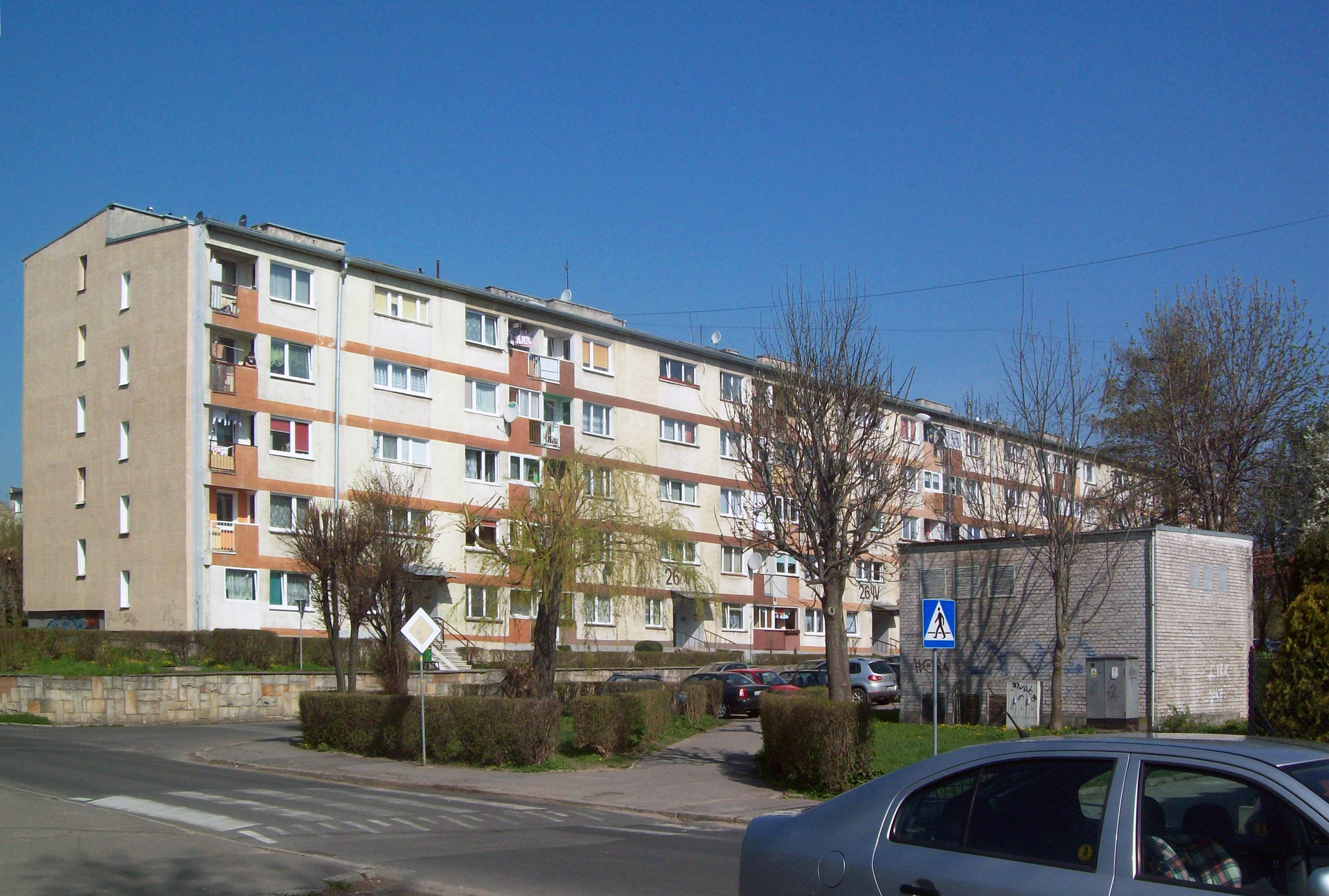 Klatkowiec przy ul. Okrzei w Kłodzku